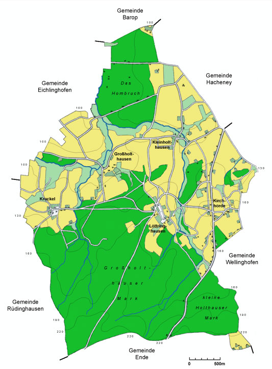 Karte der Gemeinde Kirchhörde im Jahr 1828